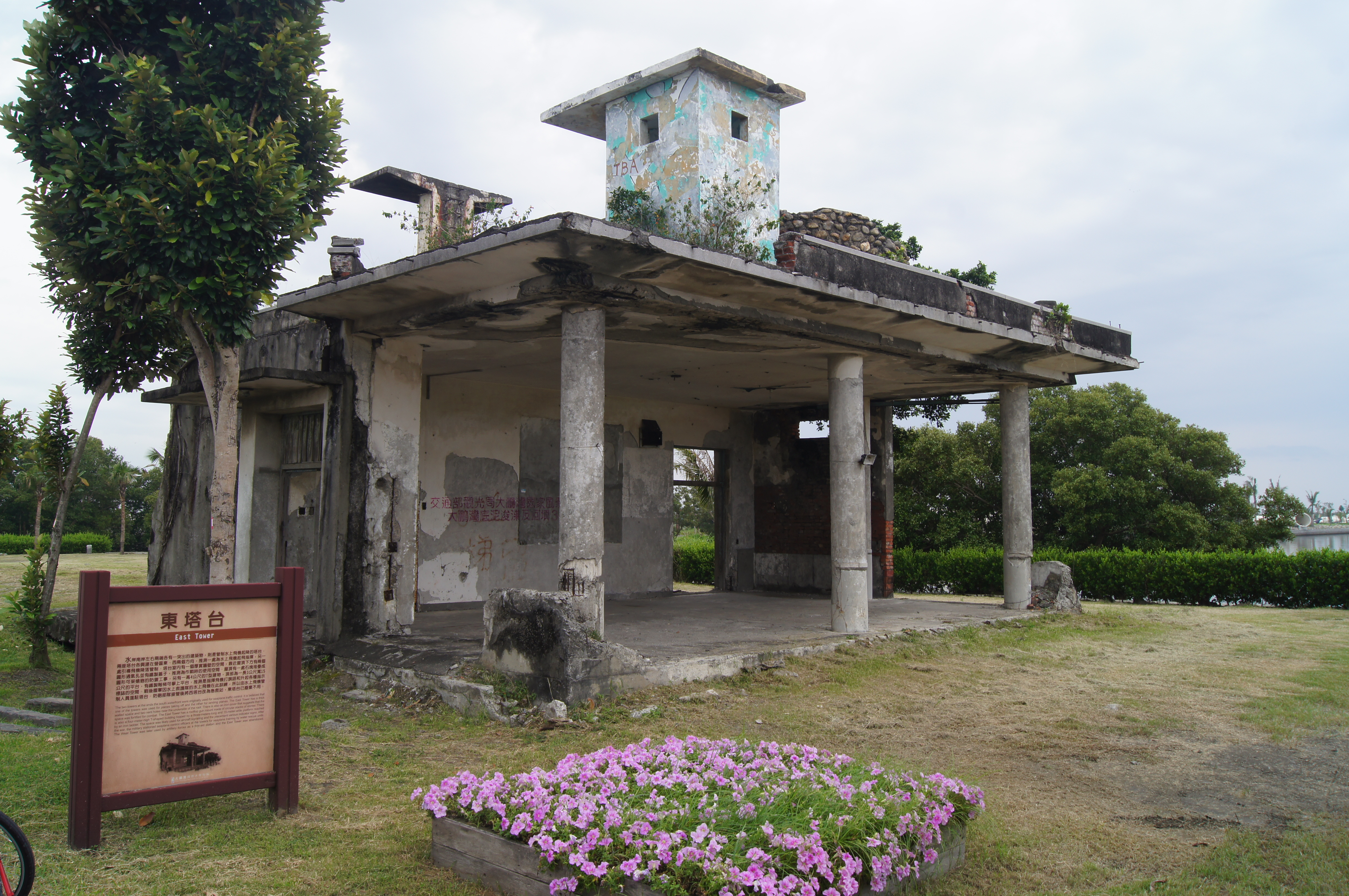 東港鎮大鵬湾に残る、東港海軍航空隊の管制塔跡(東側）。